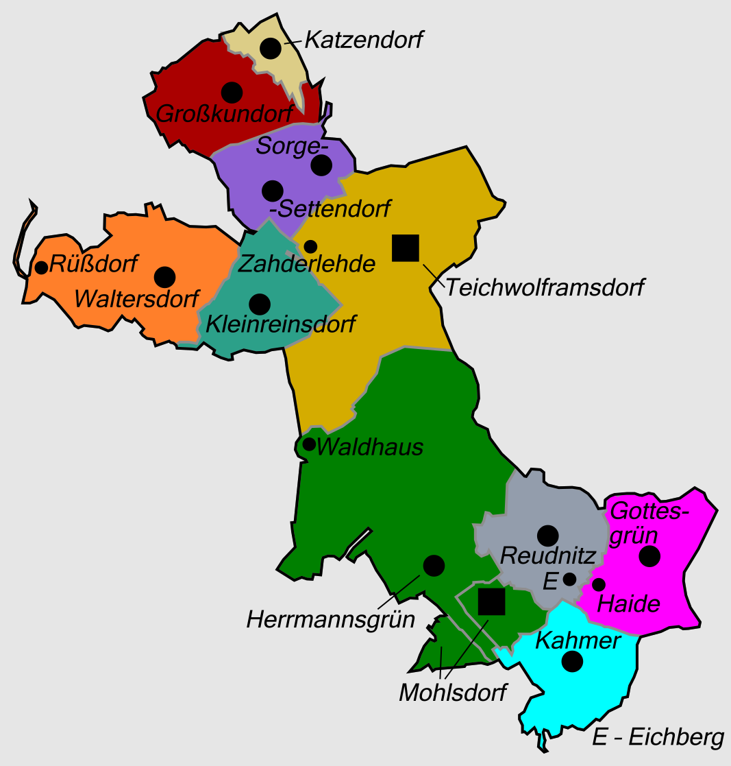 Gliederung der Gemeinde Mohlsdorf-Teichwolframsdorf ab 1. April 1928